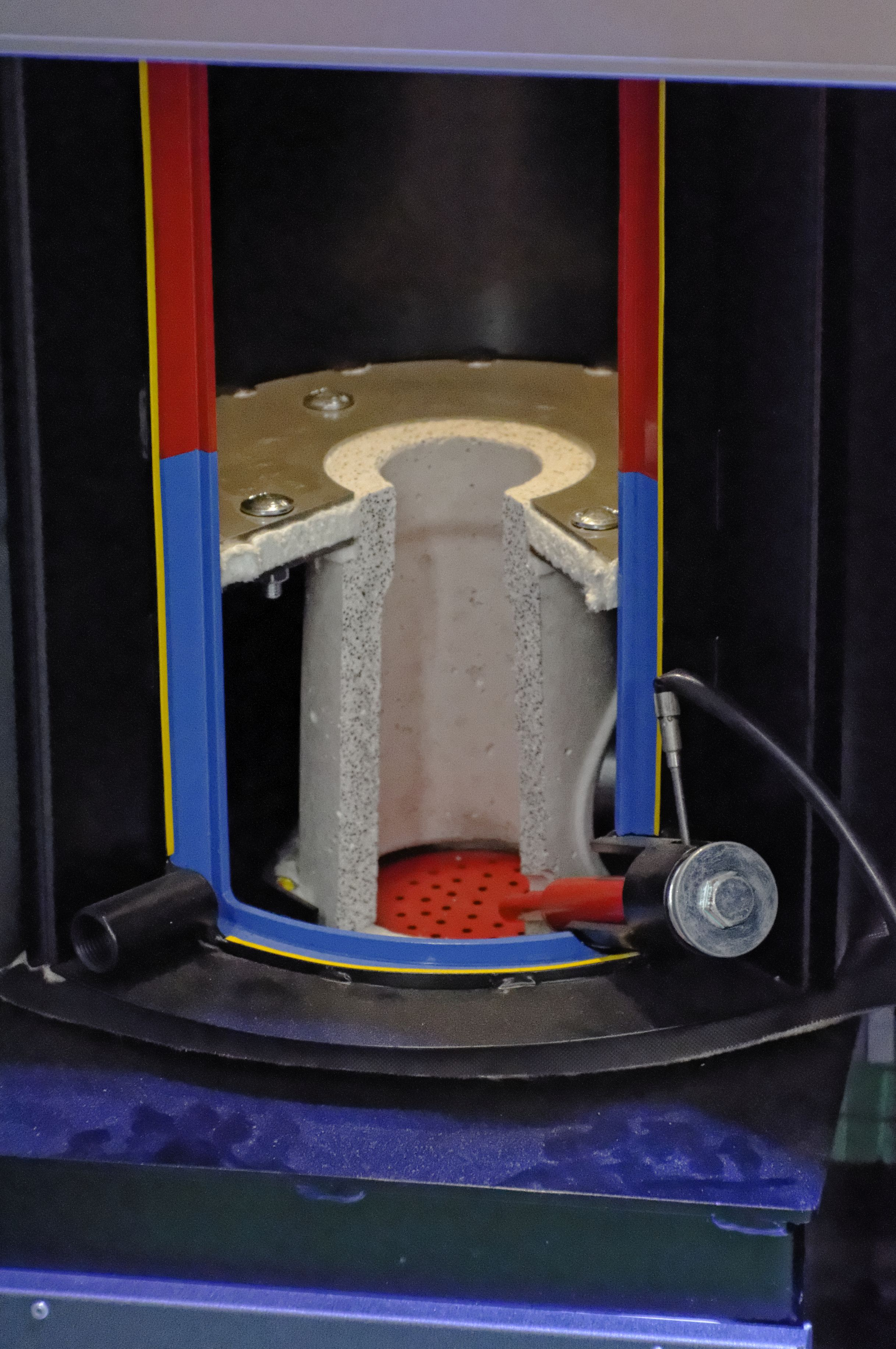 Sindelfingen Haus & Energie 2019